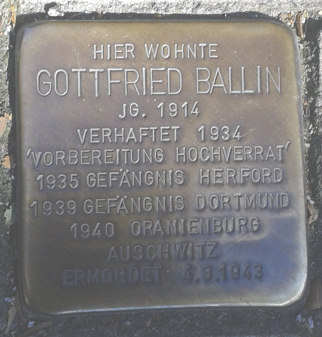 Stolperstein Köln Steinfelder Gasse 8 Gottfried Ballin